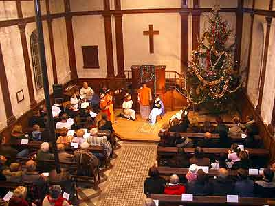 Interieur du Temple protestant de Wanquetin